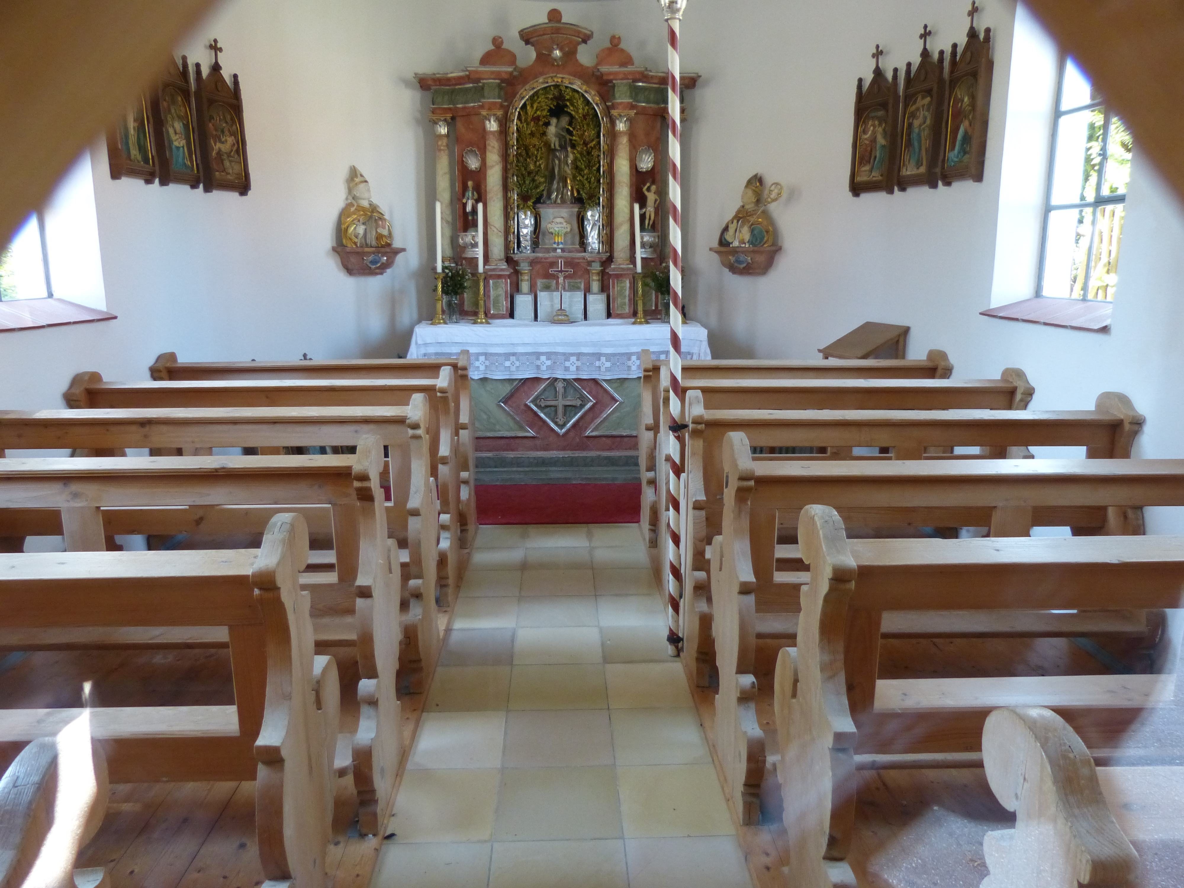 St. Anna in Wipfel, Landkreis Unterallgäu, Bayern